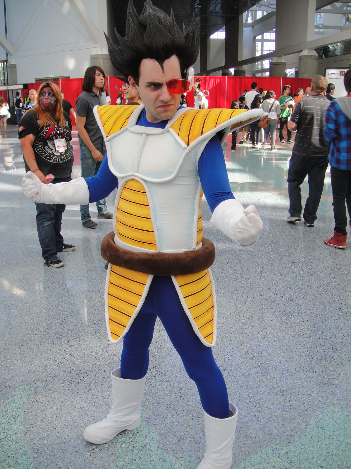 Anime Expo 2011 - Vegeta from Dragonball Z